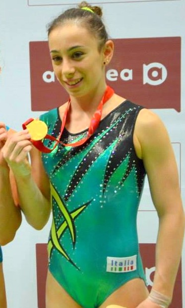 Martina Rizzelli con la medaglia d'oro degli EYOF 2013